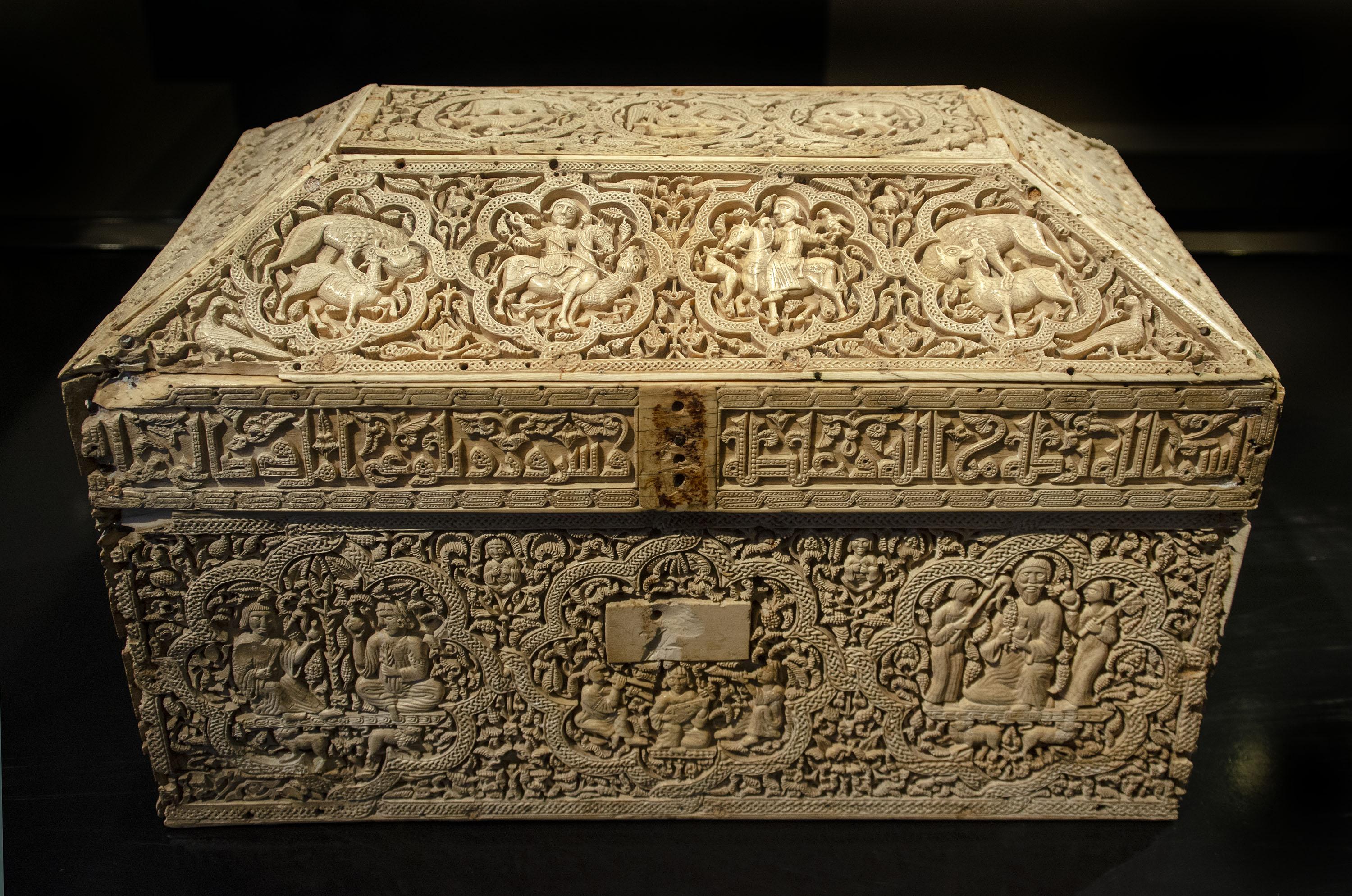 Arqueta de marfil, de 35 x 22 x 22 cm, fabricada en un taller de Madinat al-Zahra, en Córdoba, en los años 1004-1005. Esta arqueta fue utilizada como relicario en el monasterio de Leyre; pasó luego a la iglesia de Santa María la Real de Sangüesa, al tesoro de la catedral de Pamplona y finalmente al Museo de Navarra con el número de inventario CERES CE000038.